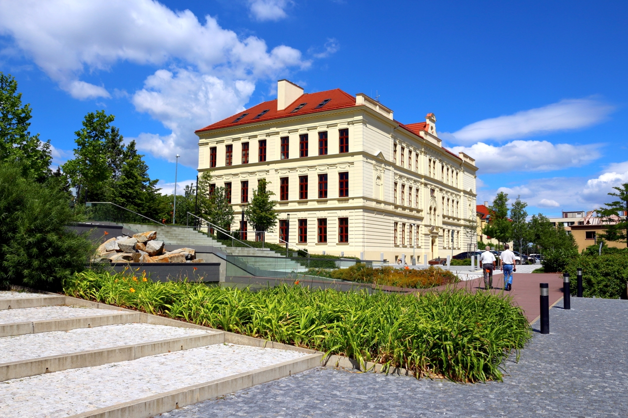 Budova křesťanské školy Elijáš